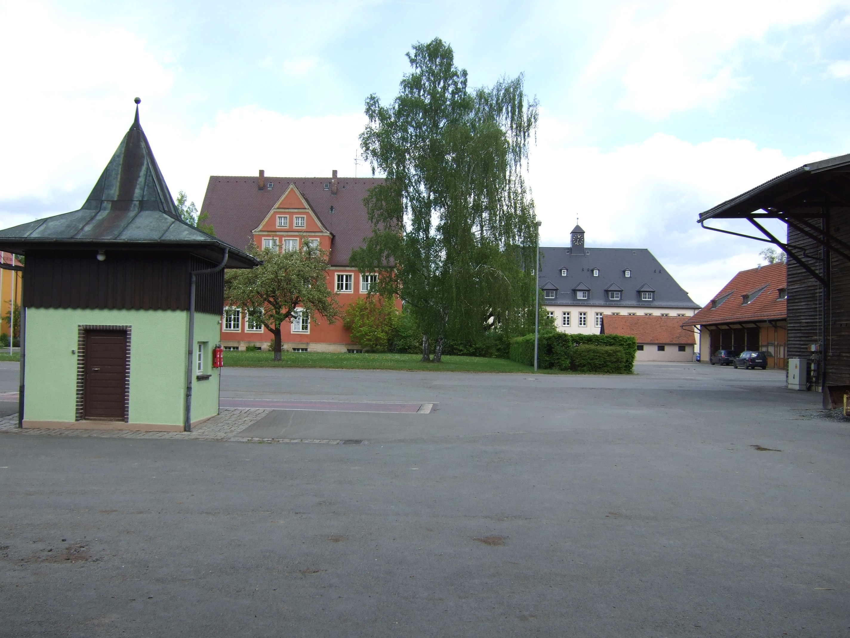 Landwirtschaftliche Lehranstalten Bayreuth, Adolf-Wächter-Str. 39